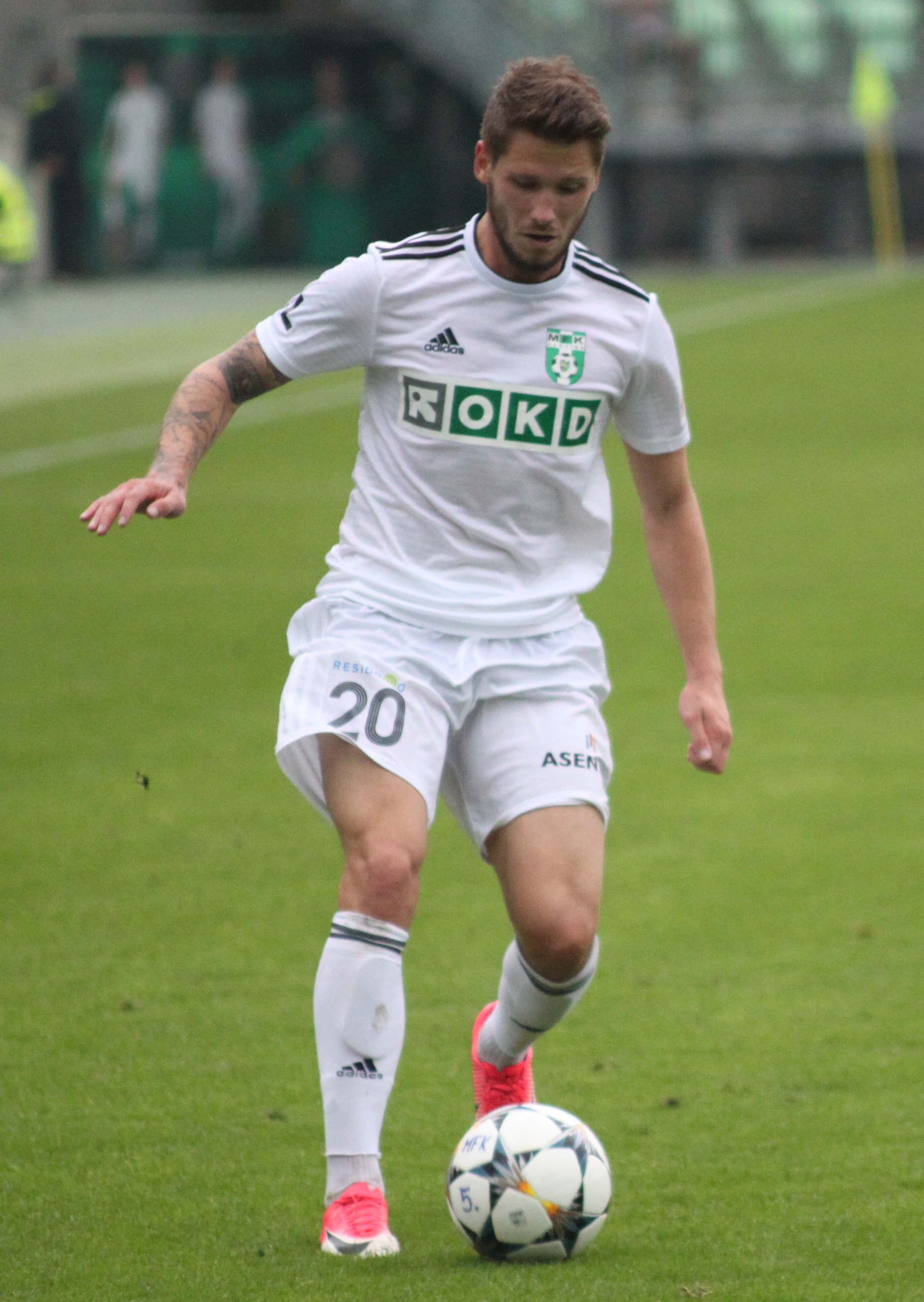 Luboš Tusjak při domácím provligovém zápase MSK Karviná-1. FC Slovácko